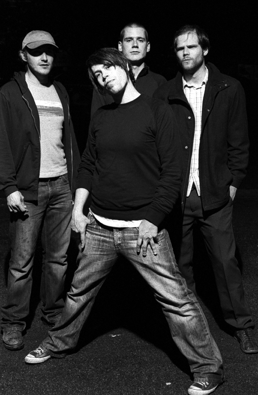 Groepsfoto van Willo The Wisp.